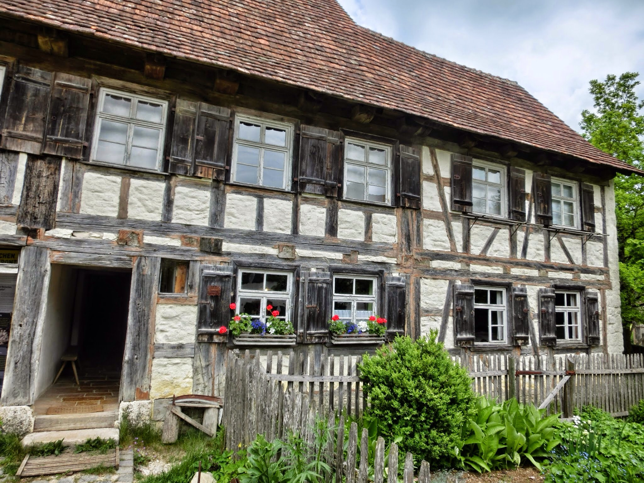 Deutschland - Baden-Württemberg - Landkreis Tuttlingen - Neuhausen ob Eck: Freilichtmuseum, Bauernhaus Biehle